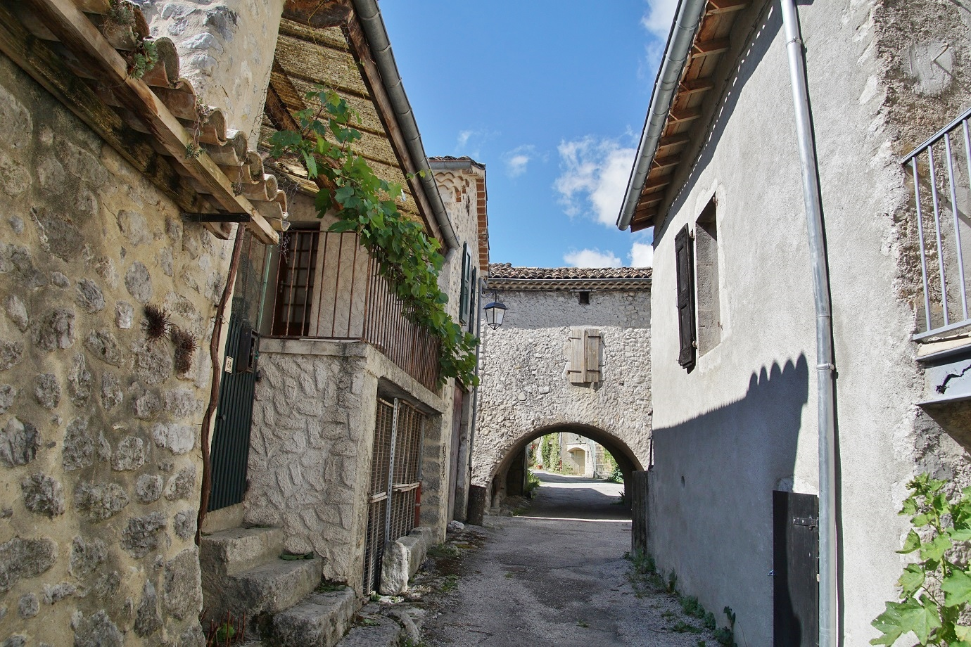 département de la Drôme